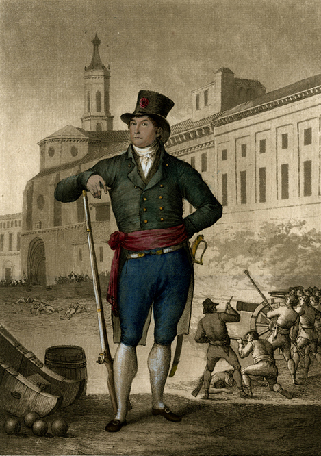 Felipe_Sanclemente, heróico defensor de la ciudad de Zaragoza